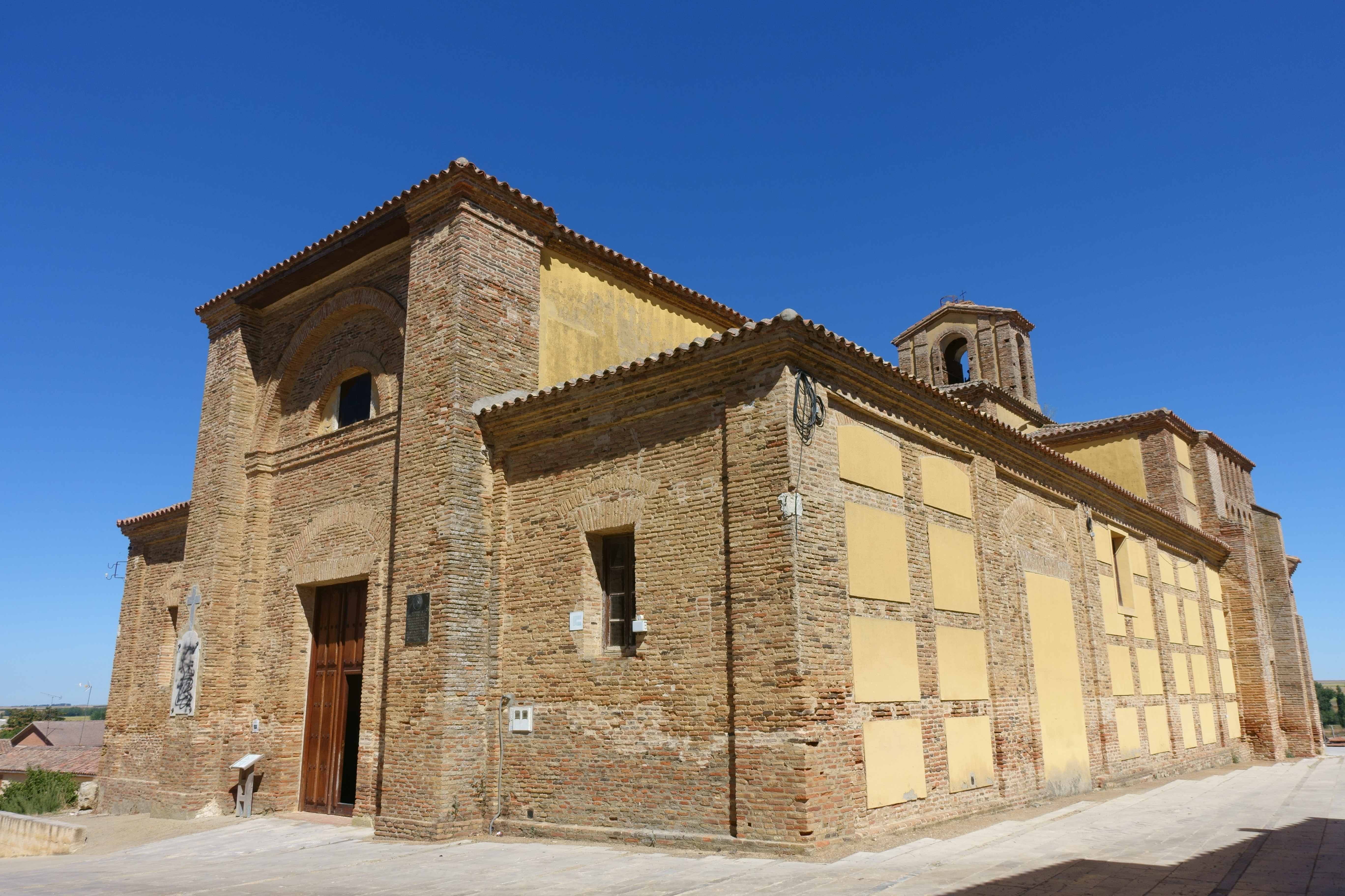 Iglesia de San Gervasio y San Protasio, Santervás de Campos (Valladolid, España).